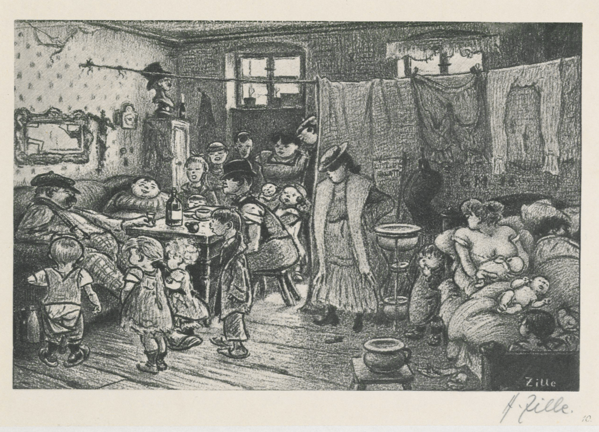 Heinrich Zille Blatt mit dem Titel "Geburtstag" aus der Grafischen Sammlung der Stiftung Stadtmuseum Berlin